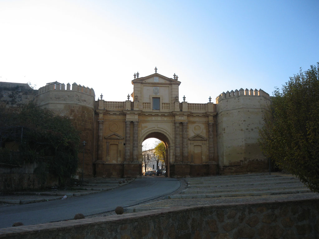 Puerta de Córdoba, Carmona-Sevilla-Andalucía-España